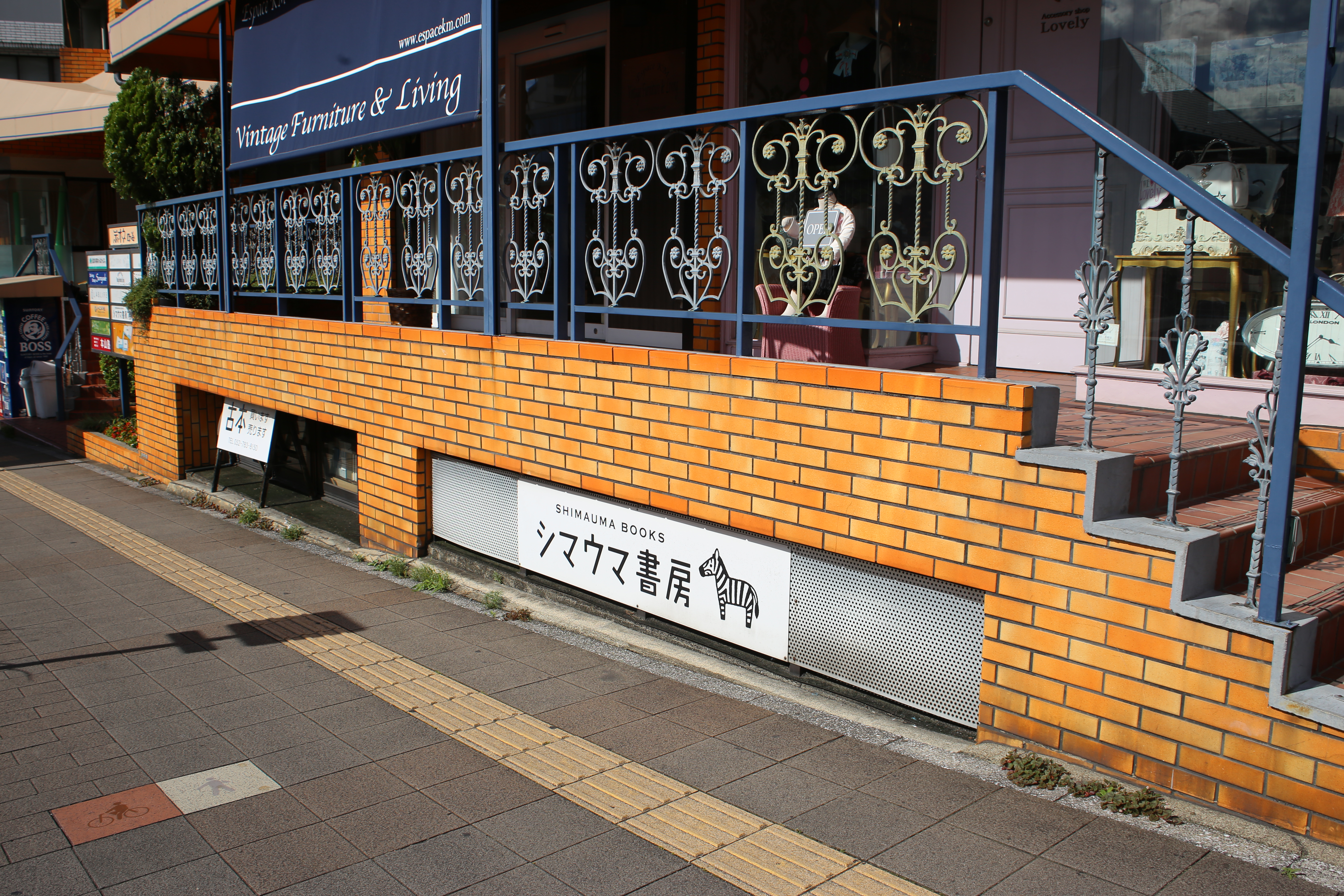 名古屋市千種区四谷通のシマウマ書房外観